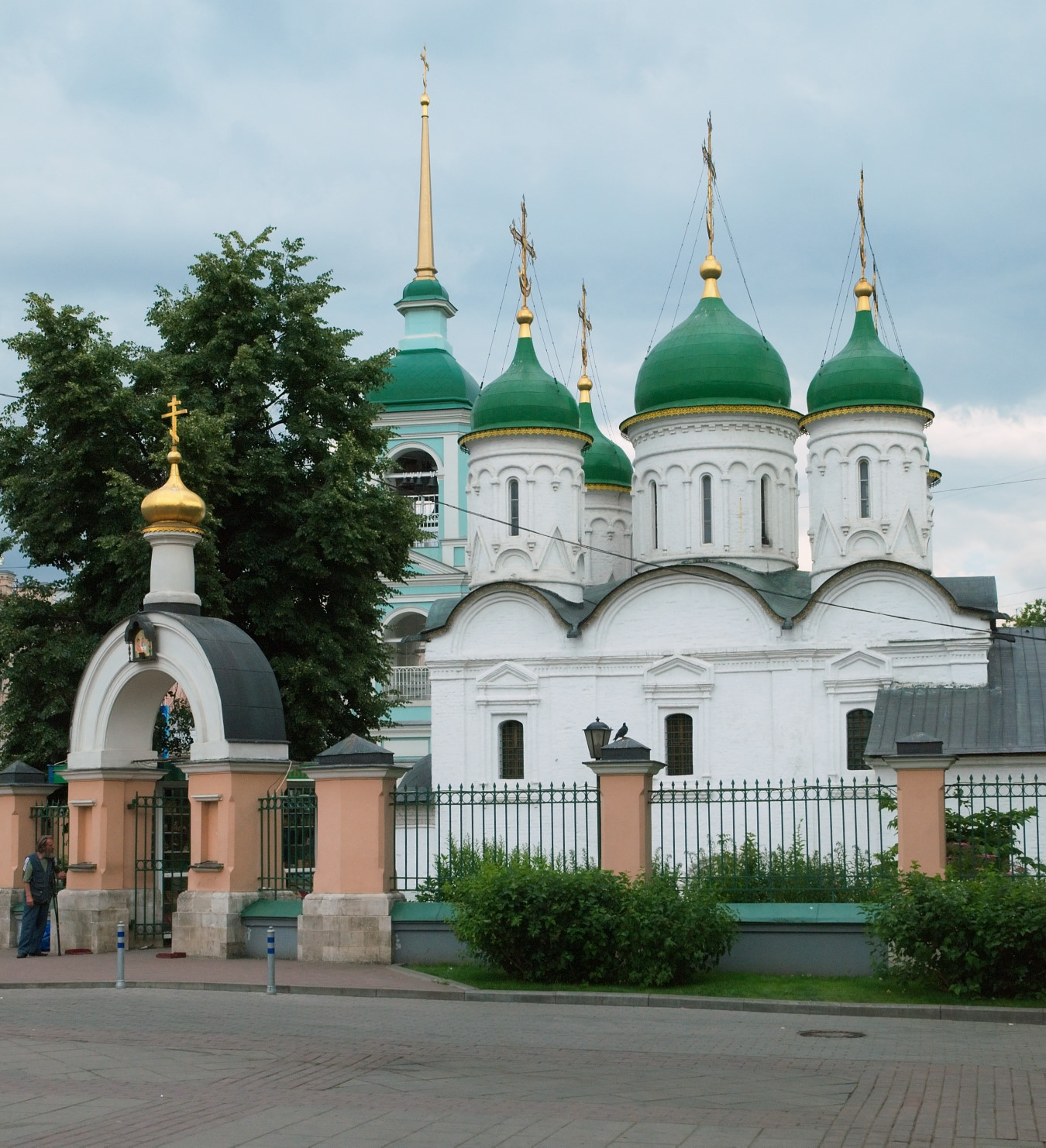 Церковь Троицы в Листах (ул. Сретенка), Москва.